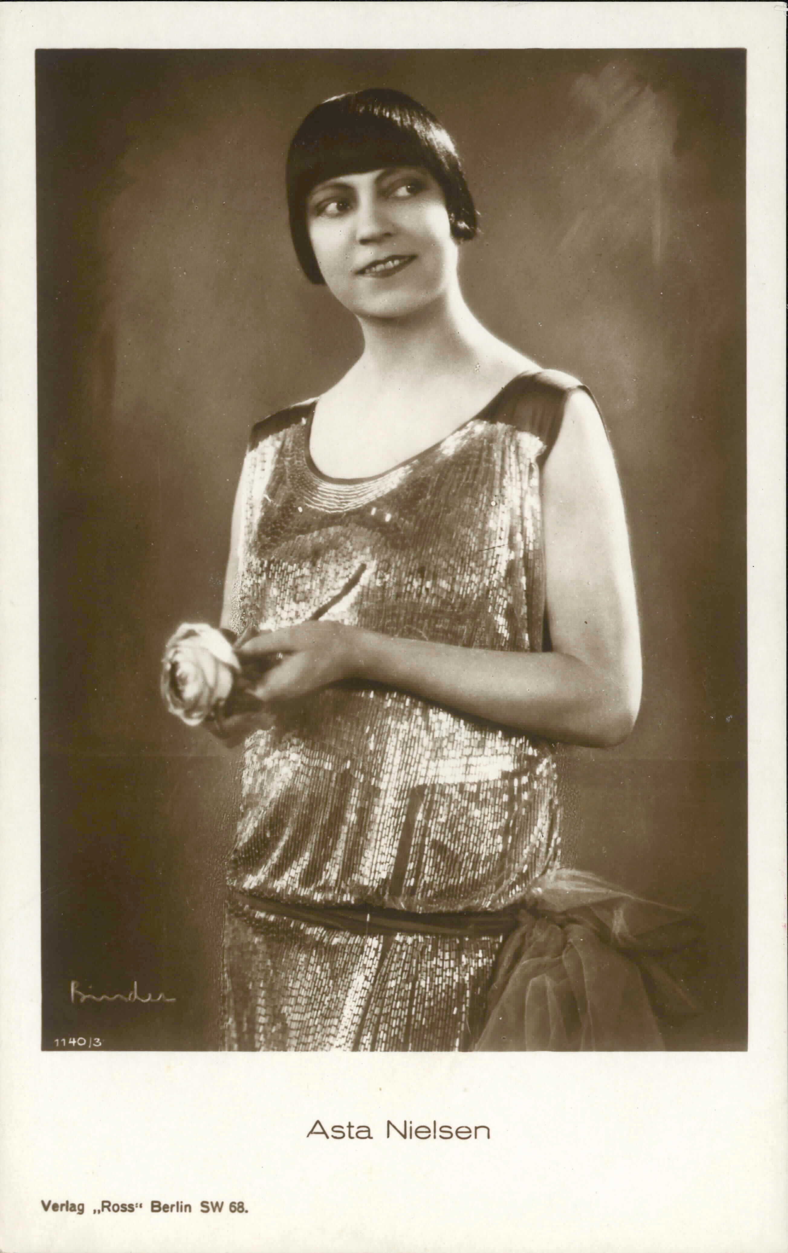 Asta Nielsen, 14 x 9 cm. Ross Verlag 1140-3